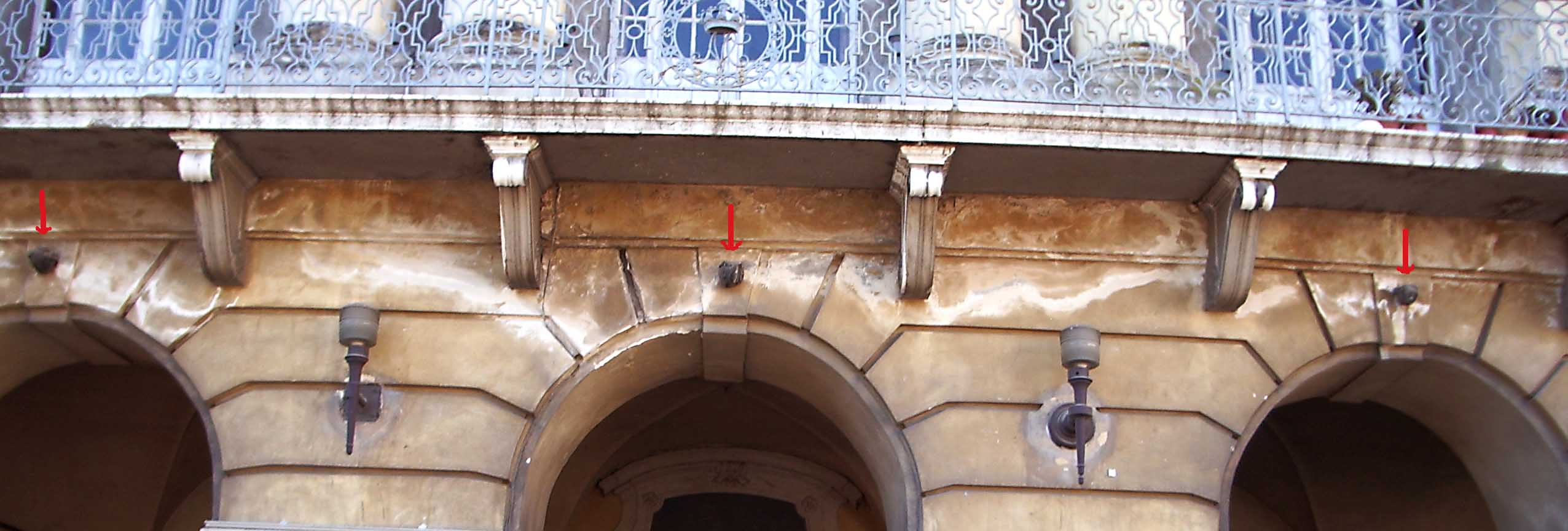 Boulets tirés sur la citadelle de Nice en 1543 et conservés sur les arcades de la place Garibaldi.